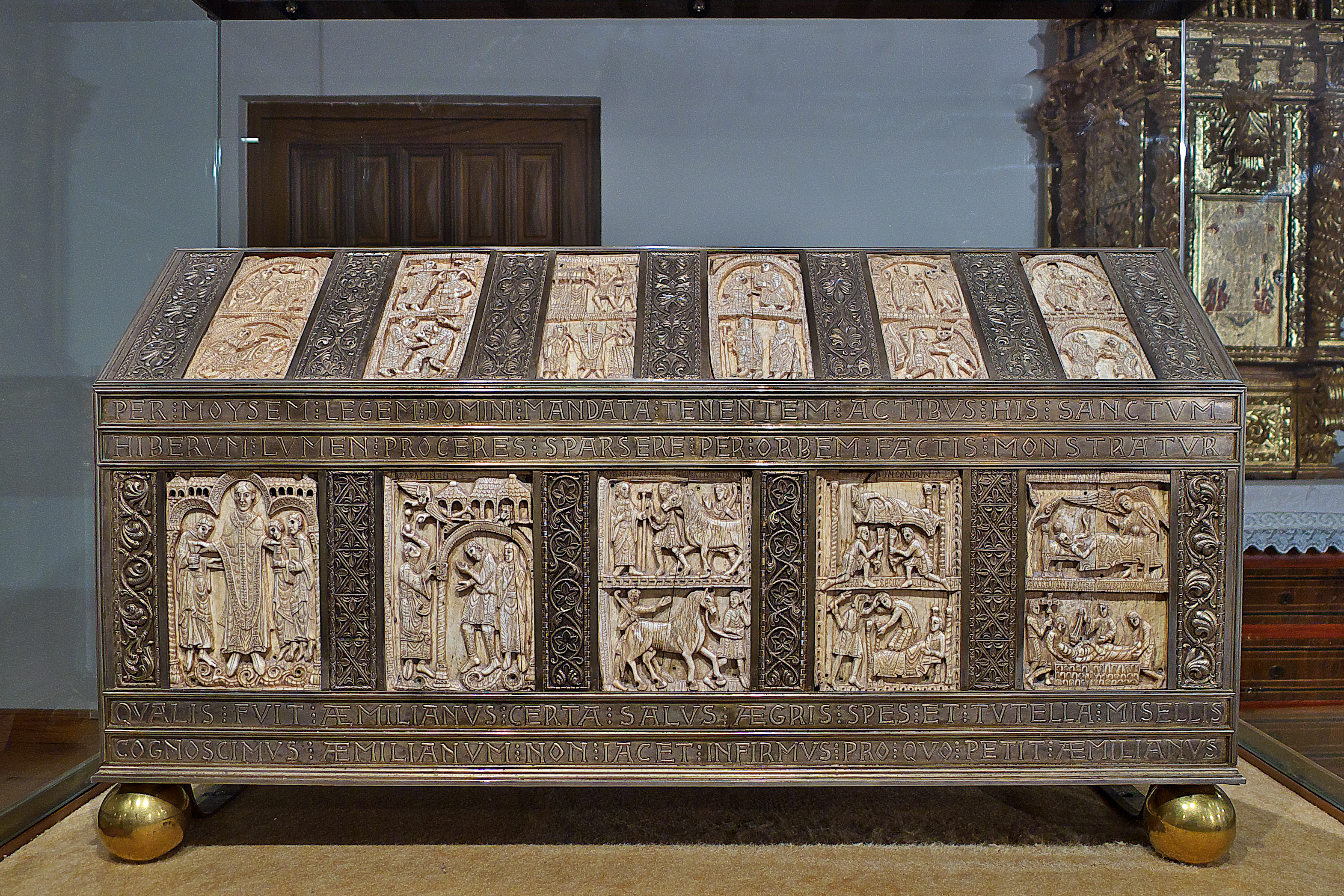 Braulio de Zaragoza (ca. 590-651) escribe Vita Sancti Aemiliani (Vida y Milagros del Gloriosísimo San Millán). El monje y clérigo Gonzalo de Berceo (1197-1264) escribe Estoria del Sennor Sant Millan. El primer abad del monasterio benedictino, don Blas y el escriba Munio, inician y diseñan el proyecto (1067-1081) de un arca para contener las reliquias de San Millán de la Cogolla (†574). Tallan veintidós placas magistralmente en marfil, el maestro Engelram, su hijo Redolfo y discípulo Simeón, con técnicas de los mozárabes de Qurtuba. La invasión francesa (1809) y su expolio, destruye el relicario y ocasiona la pérdida de tarjetas, hoy, desafortunadamente, cuatro en The Small Hermitage, Museo del Hermitage, Engelram magistro et Rodolfo filio (Engelram Magistro et Rodolfo Filio), El rey Ramiro y su retenedor (Ramirus Rex y Aparicio Scolastico), Munio Procer y Gomessanus Praepositus, y el Abad Peter y un monje (Petrus Abba y Munio Absecla); Metropolitan Museum of Art, Nueva York (Museo Metropolitano de Arte), placa San Emiliano sube al Dircetius Mons para ser bendecido por Dios/San Millán, pastor de ovejas; tema, Muerte de Emiliano en Museo Nazionale del Bargello, Florencia. Esta placa es parte de la existente en el Fine Arts Museum of Boston; Muerte de san Emilio (Emiliano), Museo de Bellas Artes (Boston); y Cristo en Majestad en Dumbarton Oaks Oaks, Bizantine Collection, Washington. En el año 1931 vuelve a sufrir violaciones, siendo reconstruida en plata por los Talleres Granda, Madrid (1944), según diseño de Francisco Íñiguez Almech. Constituye pieza muy destacada en el arte románico europeo. San Emiliano sube al Dircetius Mons para ser bendecido por Dios / San Millán pastor de ovejas (ca. 1067), The Cloisters Collection (The Metropolitan Museum of Art) Cristo en Majestad, Byzantine Collection (Dumbarton Oaks)